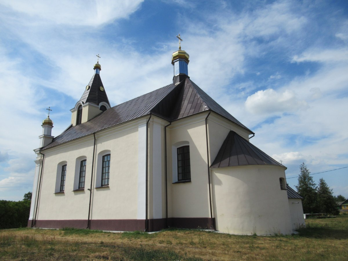 Масаляны. Царква Раства Багародзіцы